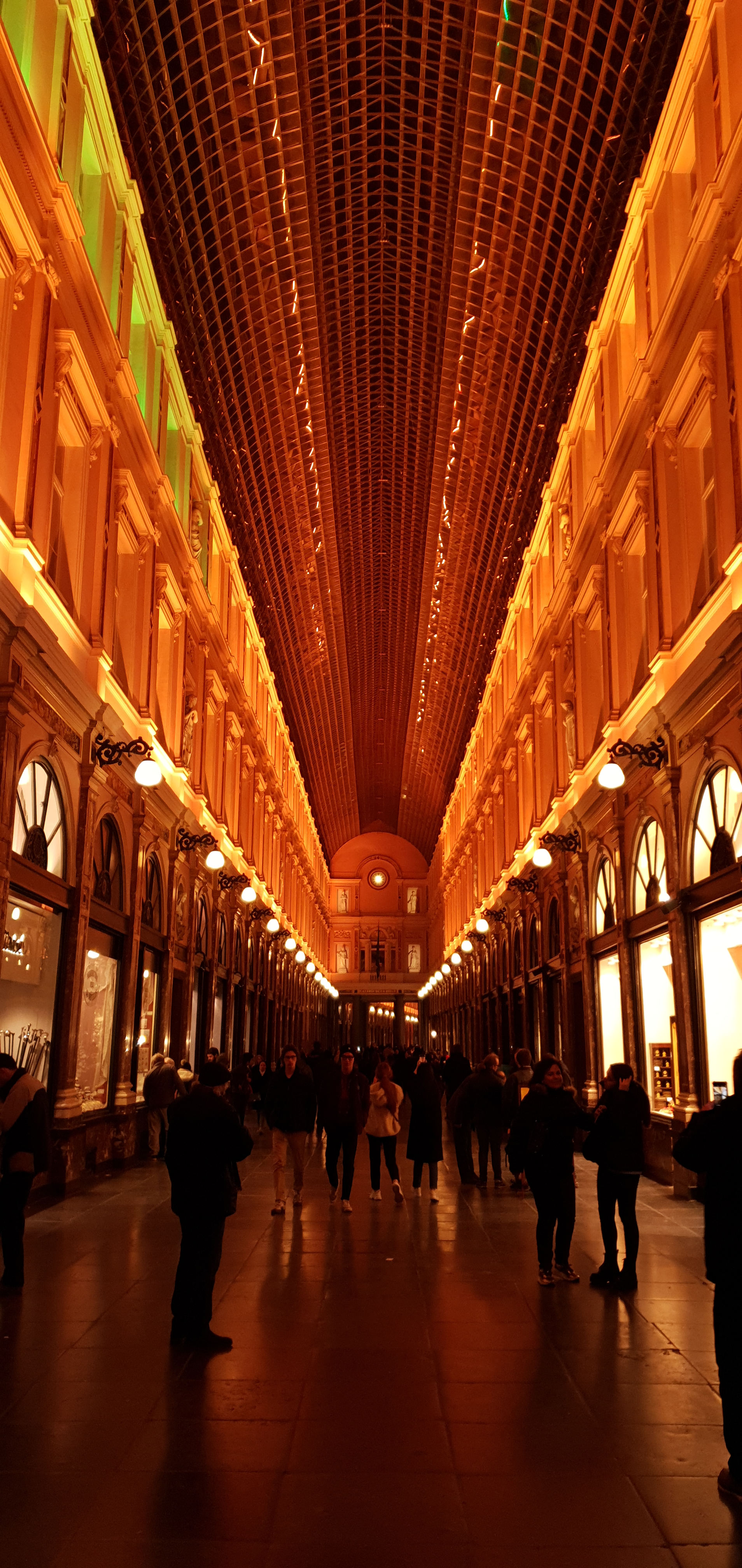 This photo has been taken in the country: Belgium